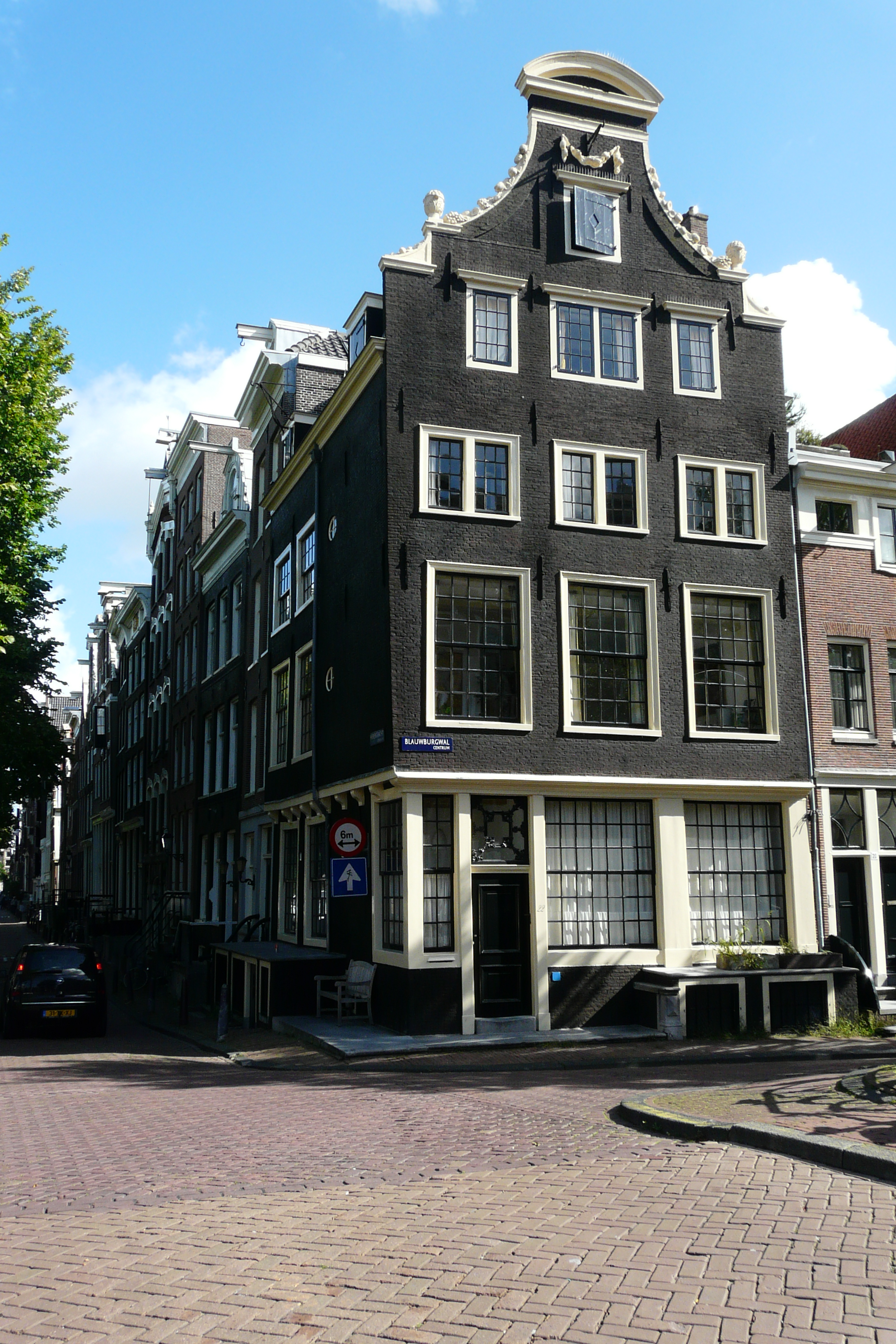 Blauwburgwal 22, een hoekhuis met een pothuis aan beide zijde. Een 17e eeuws huis met klokgevel, waar lang een bakkerij in gevestigd was